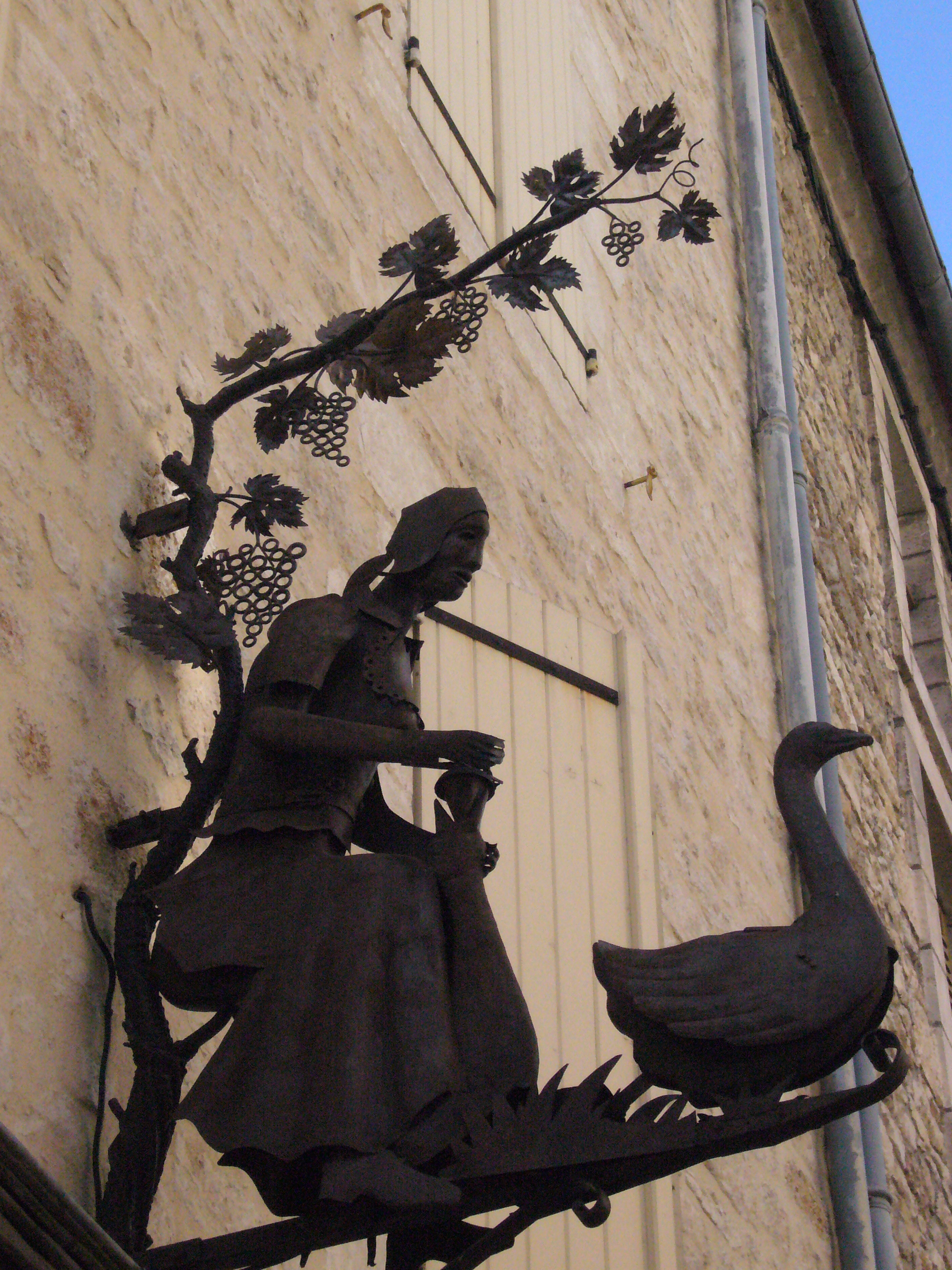 Sculpture animée en fer forgé de Jacques Laporte, ferronier d'art, écrivain et Klaus Lorenz,créateur d'automates et restaurateur d'objets d'art. Enseigne de magasin à Souillac (Lot, France)